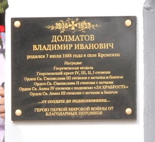 Село Кремёнки, Старомайнского района Ульяновской области